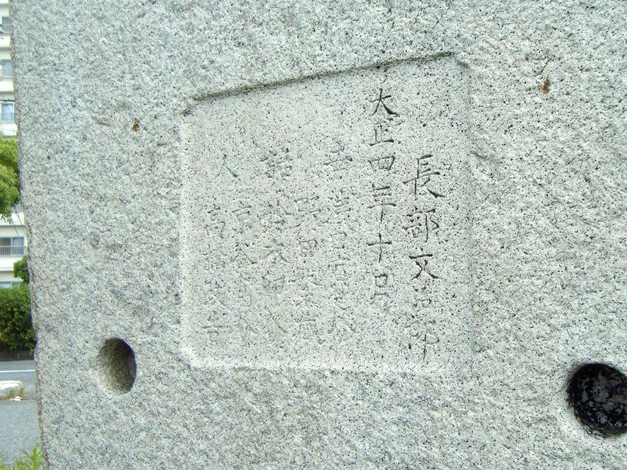 今津砲台跡（今津海岸砲台記念石） 背面 兵庫県西宮市